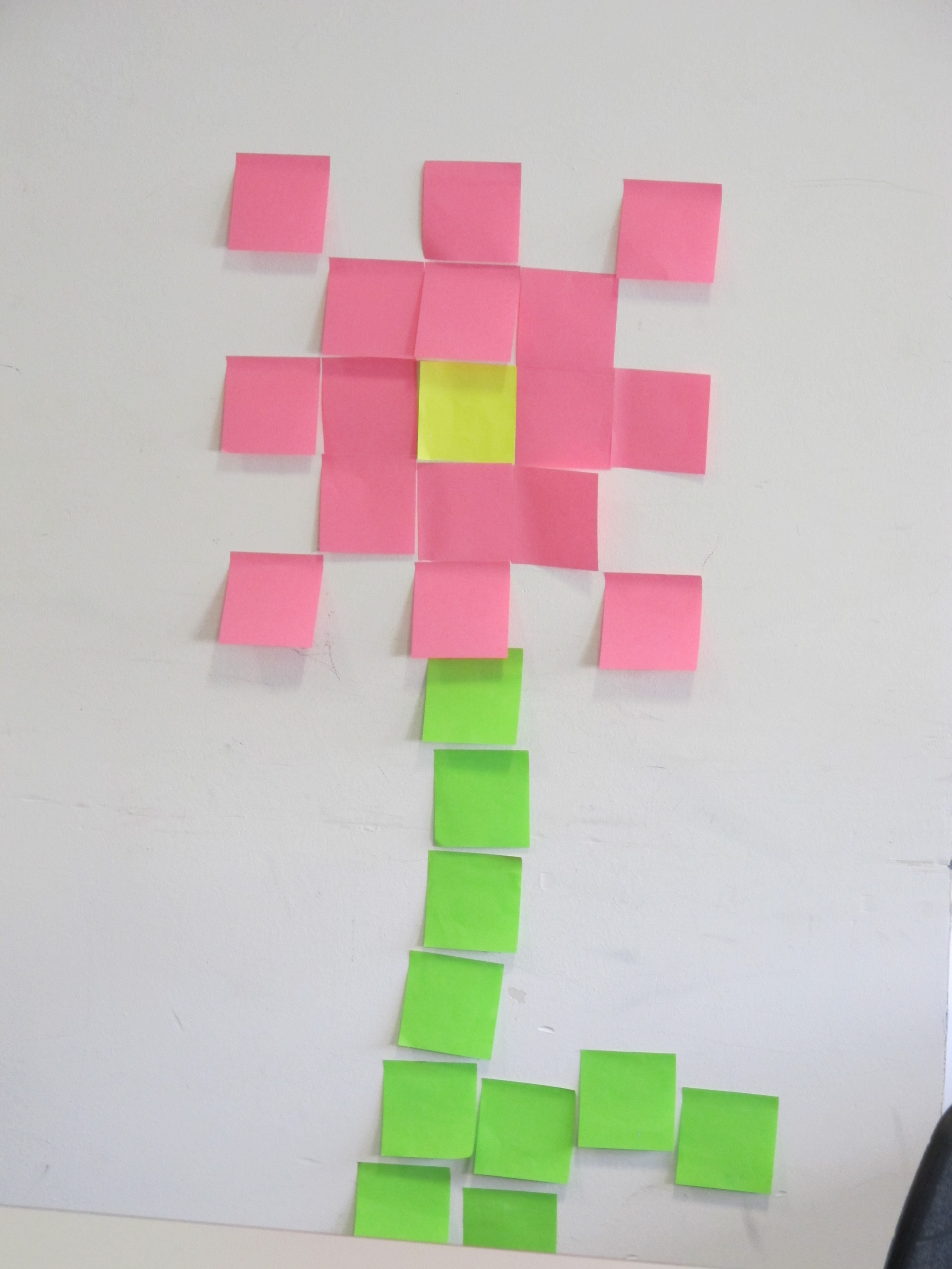 Klebezettel zur Veranschaulichung des Konzepts Pixel